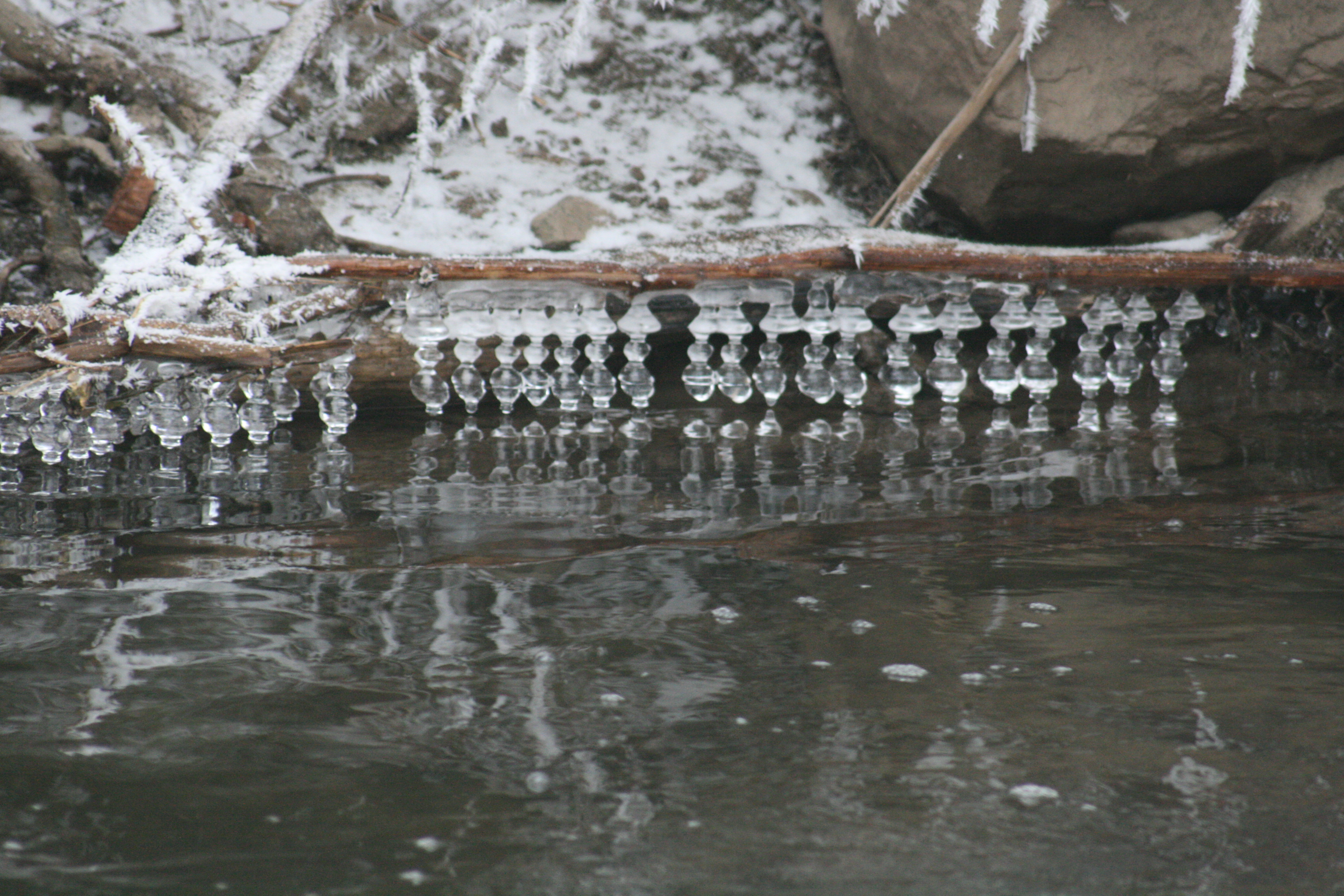 Gelées au bord de la Lauch à hauteur de Herrlisheim près de Colmar